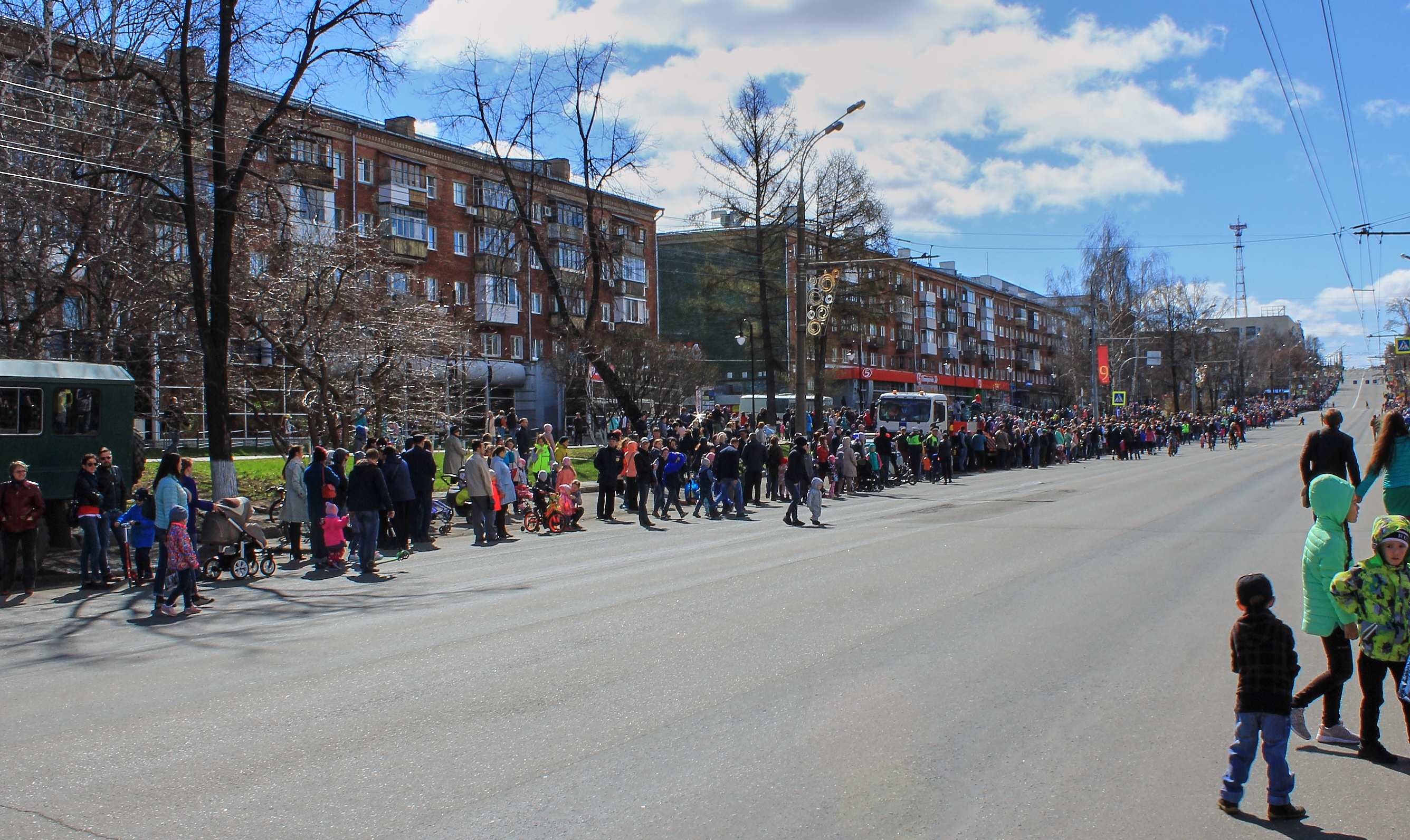 Пушкинская улица в Ижевске (вид на юг от улицы Кирова) перед началом парада Победы в 2018 году